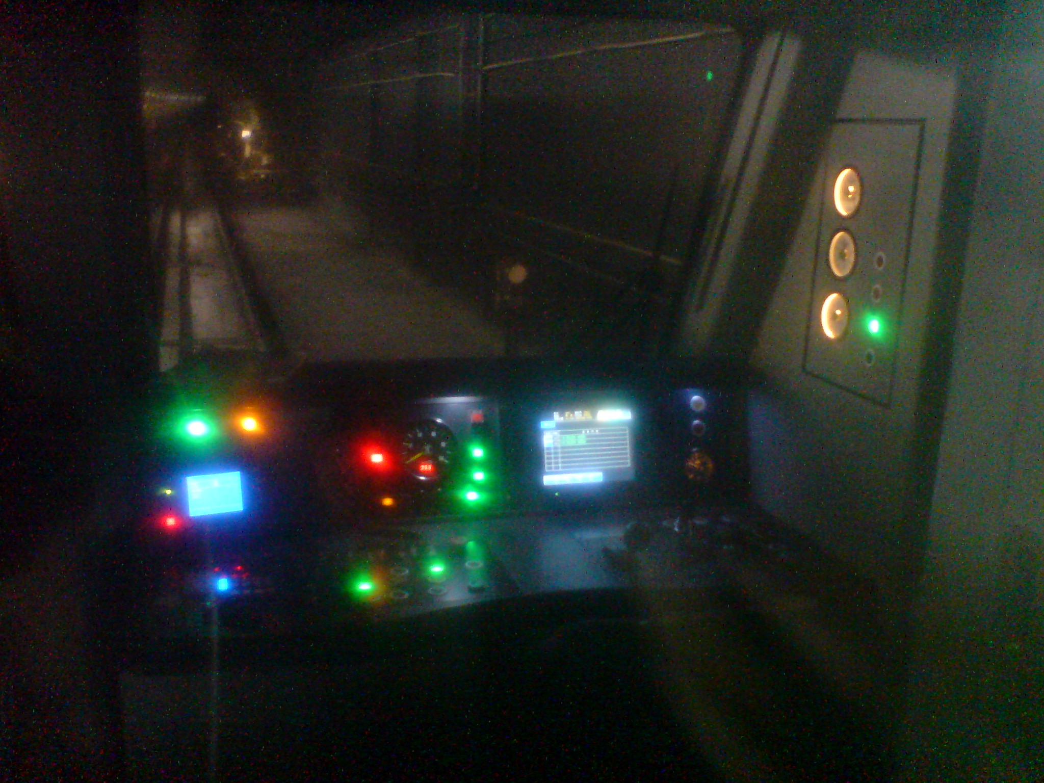 北京地铁5号线驾驶控制台